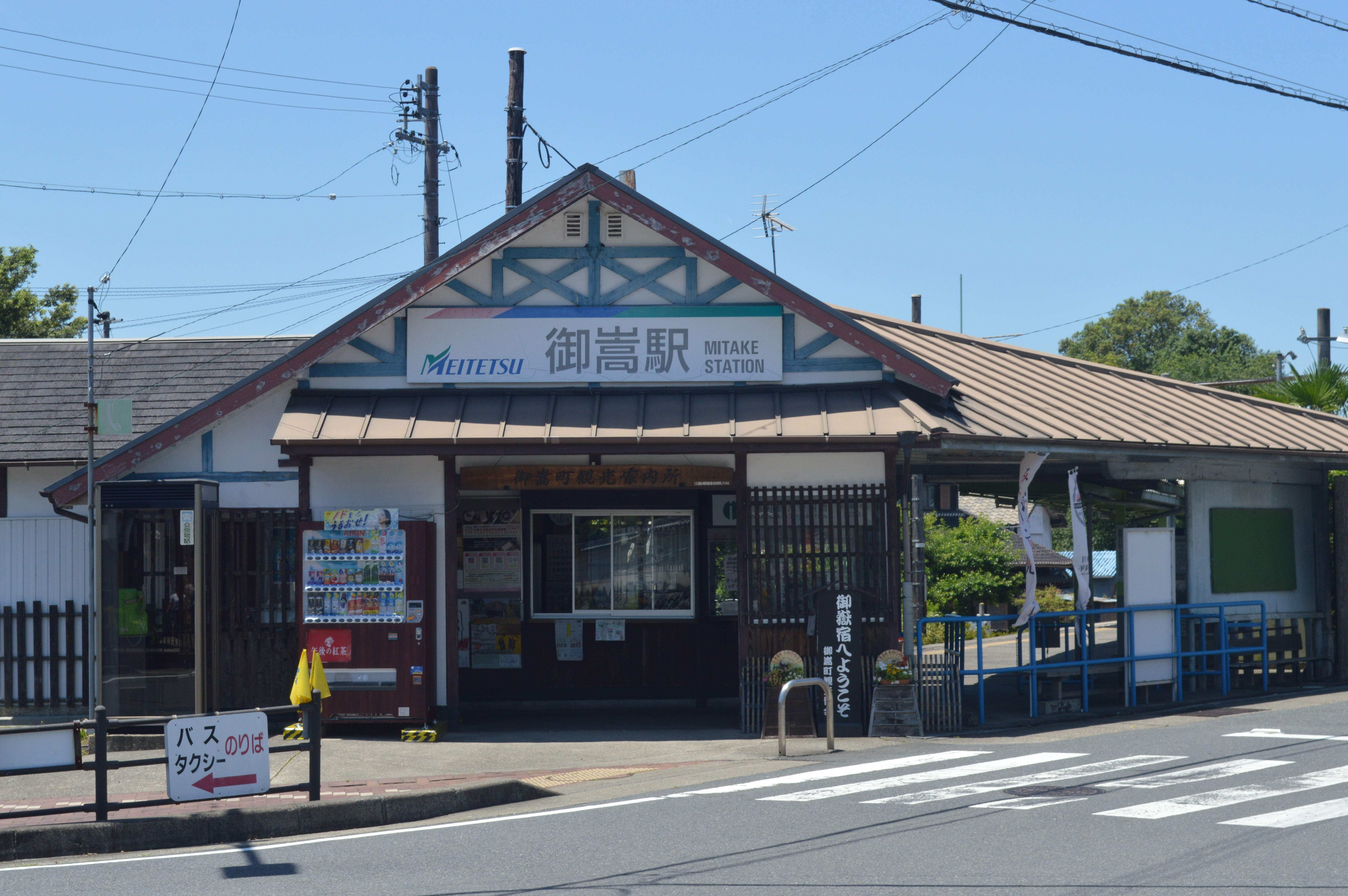 岐阜県可児郡御嵩町にある名鉄広見線御嵩駅。